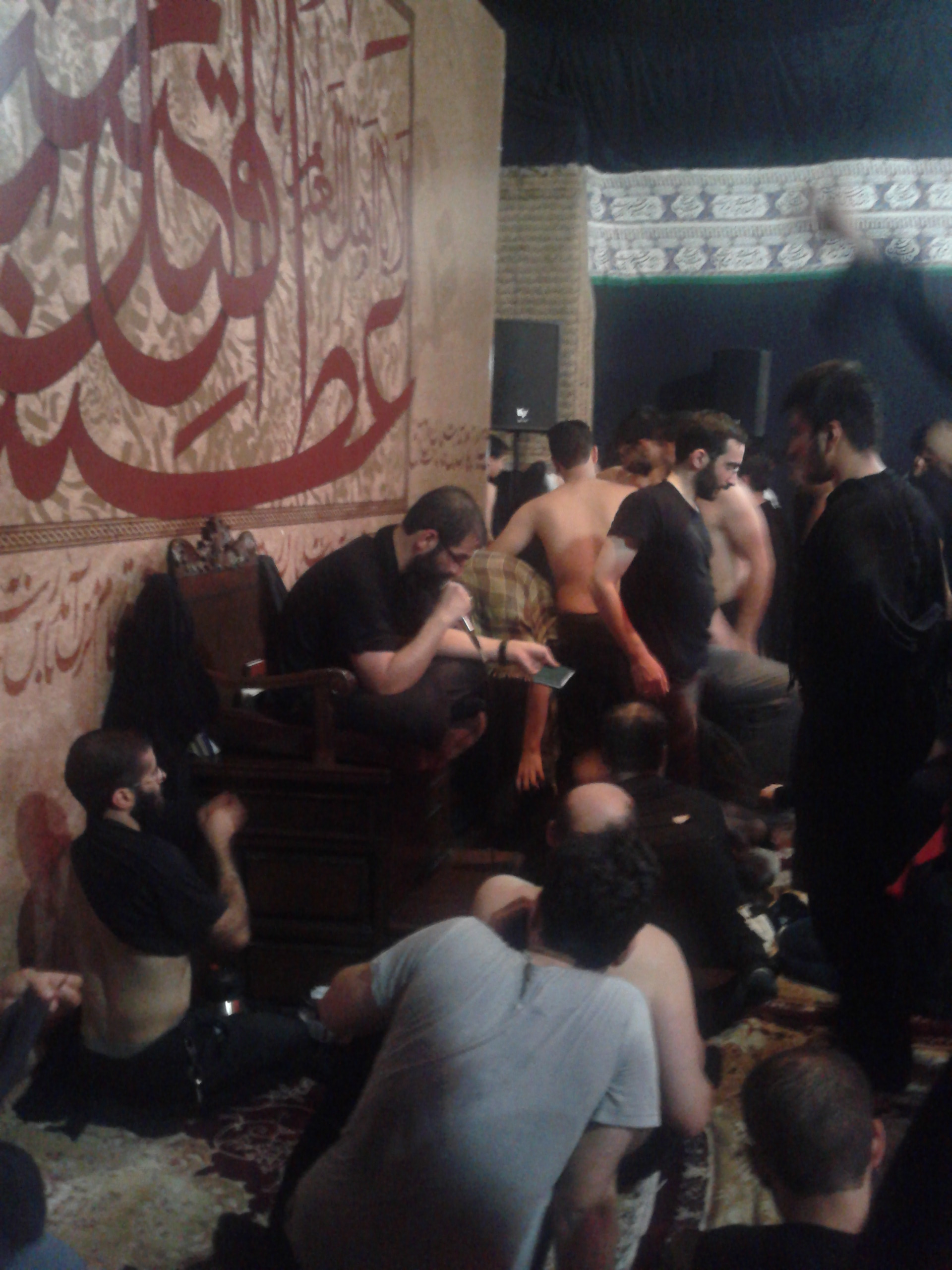 Hossein Sib sorkhi